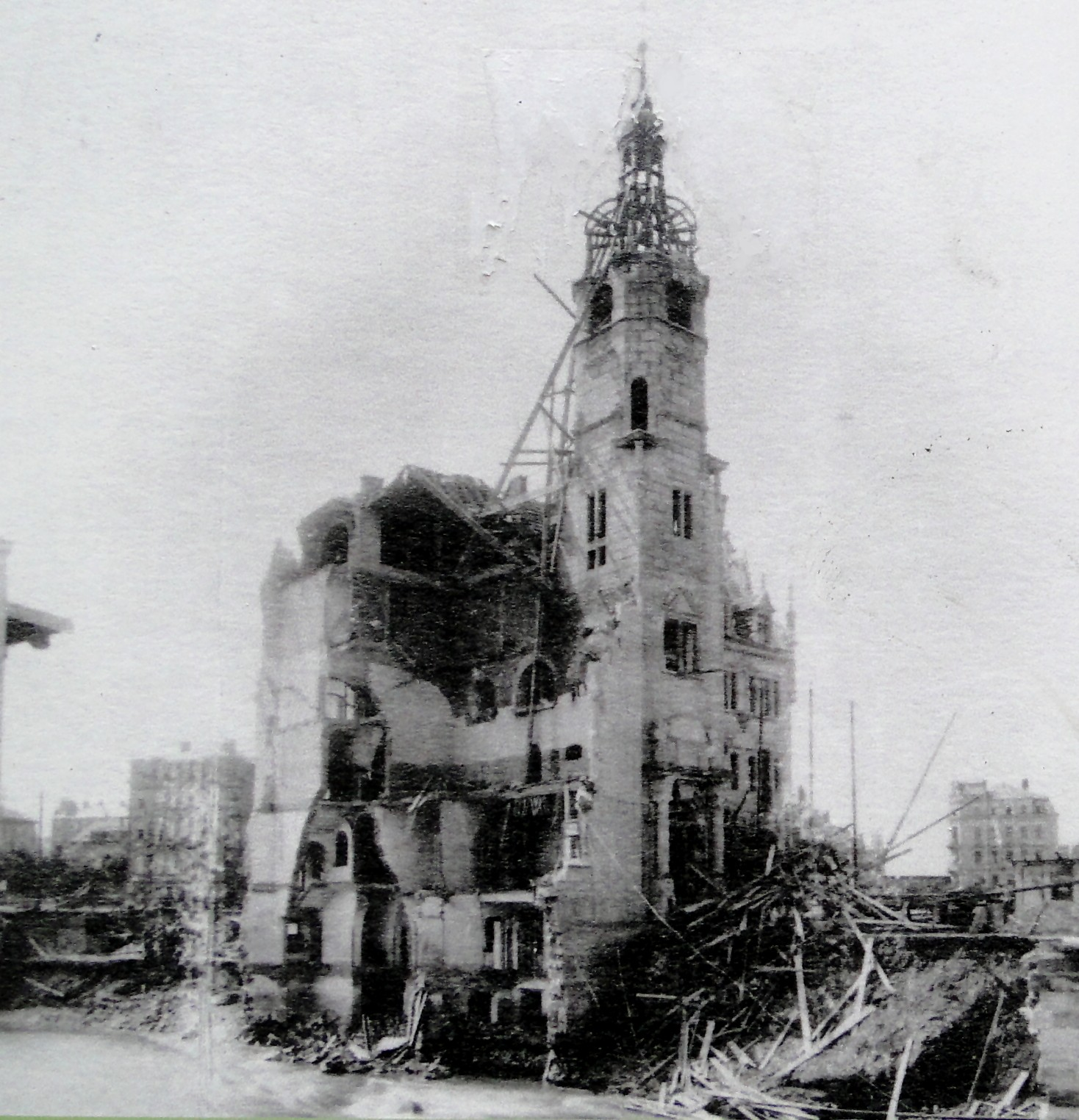 Das im Bau befindliche Alte Rathaus Löbtau kurz nach der Zerstörung durch das Hochwasser 1897